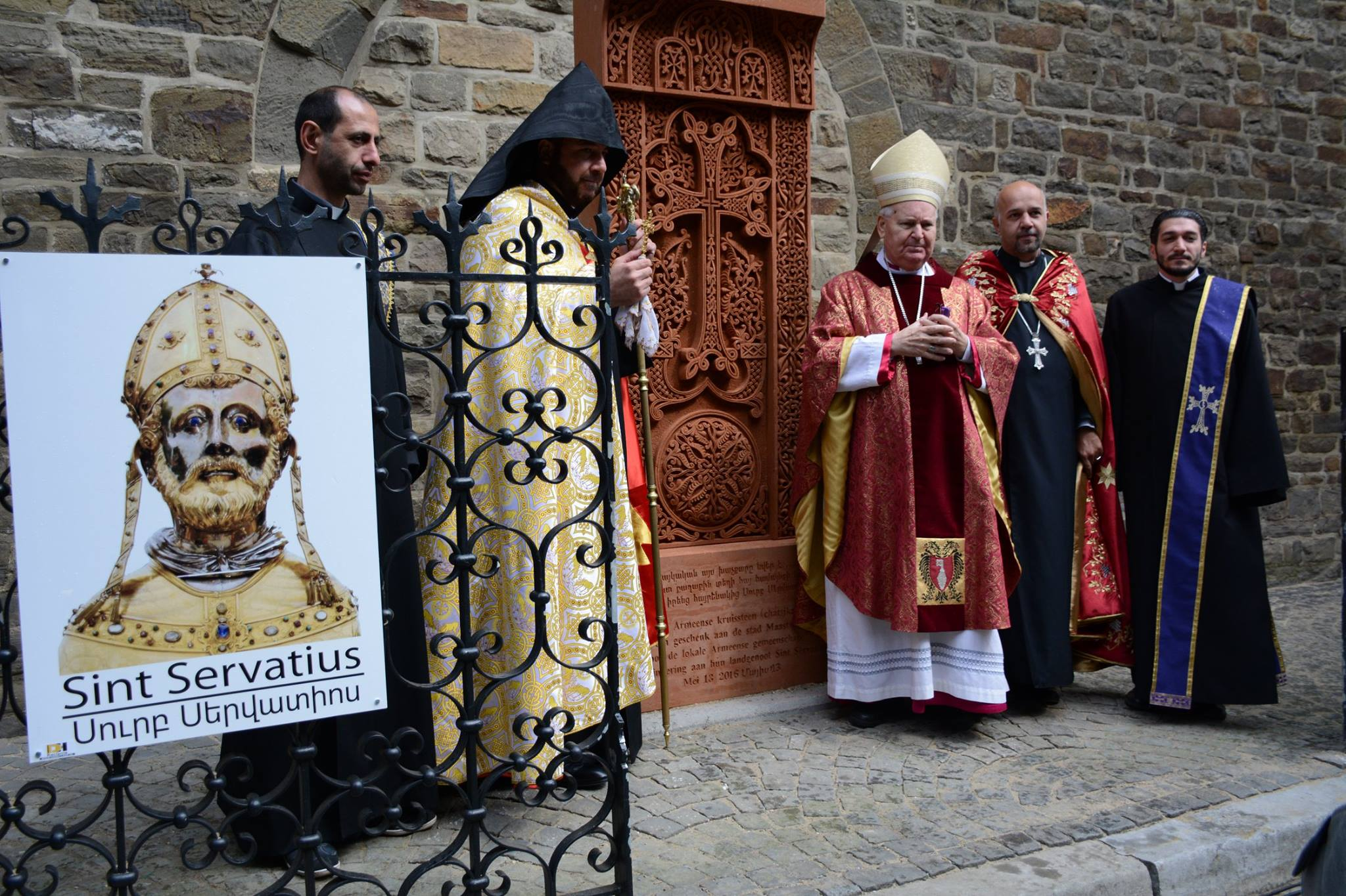 Armeense chatsjkar in Maastricht ingezegend door Bisschop van Roermond Mgr.Wiertz en vicaris Armeense kerk Nederland Mgr. Aren Sahinian.